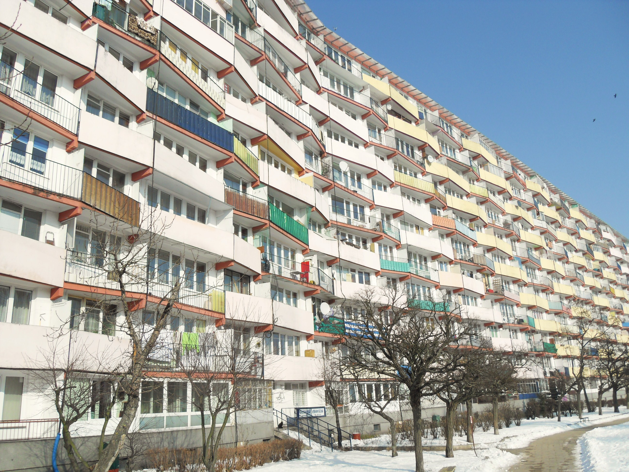 Falowiec przy ul. Piastowskiej 90 w Gdańsku Przymorzu.